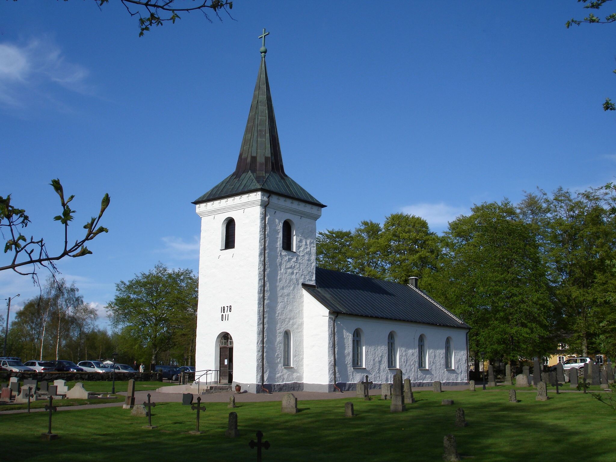 Mästocka kapell i Laholms kommun